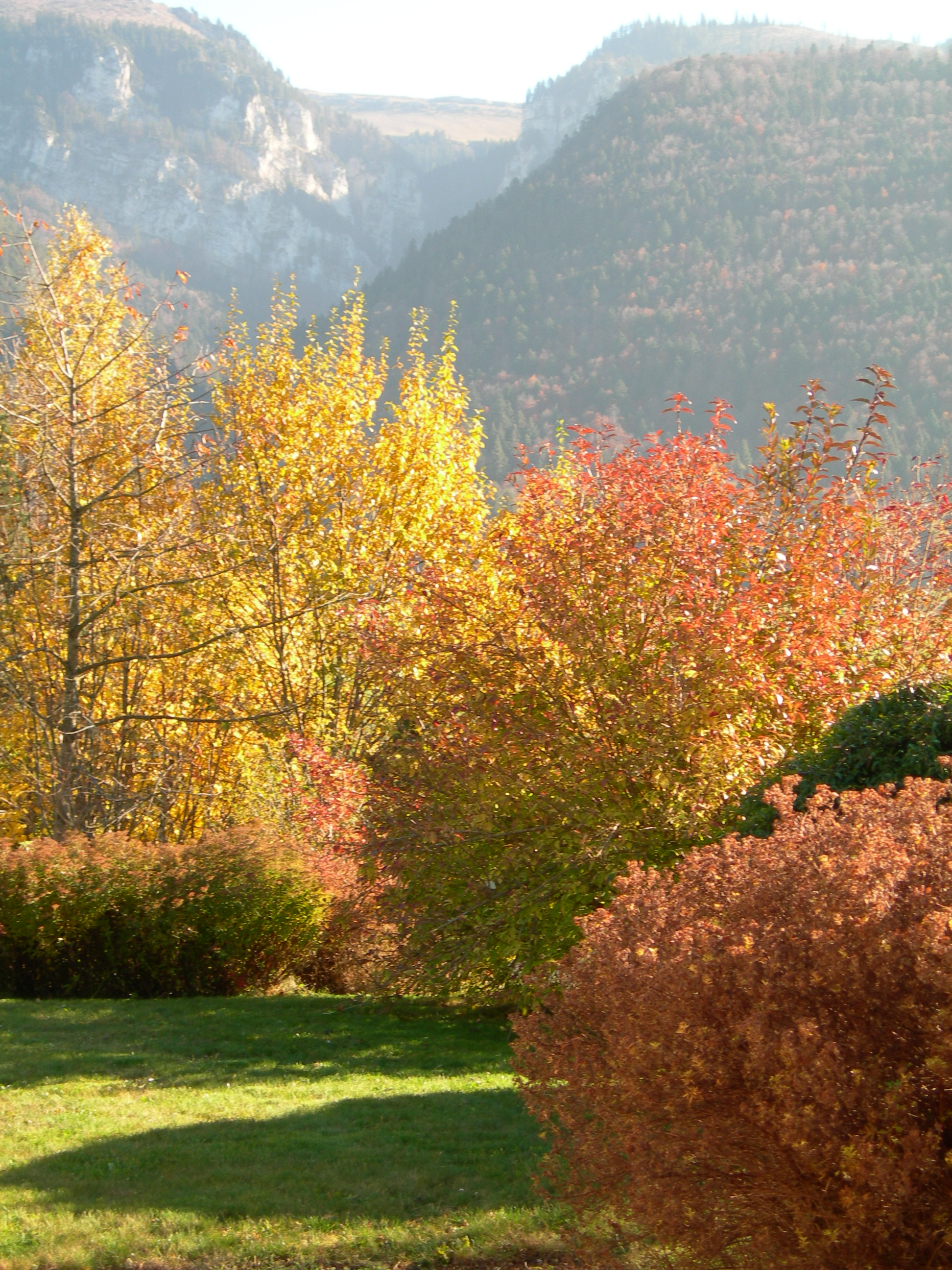 Une belle journée d'automne à Villeret en Suisse. Vue du paysage emblématique du village: La Combe Grède qui s'ouvre sur le sommet jurassien du Chasseral.